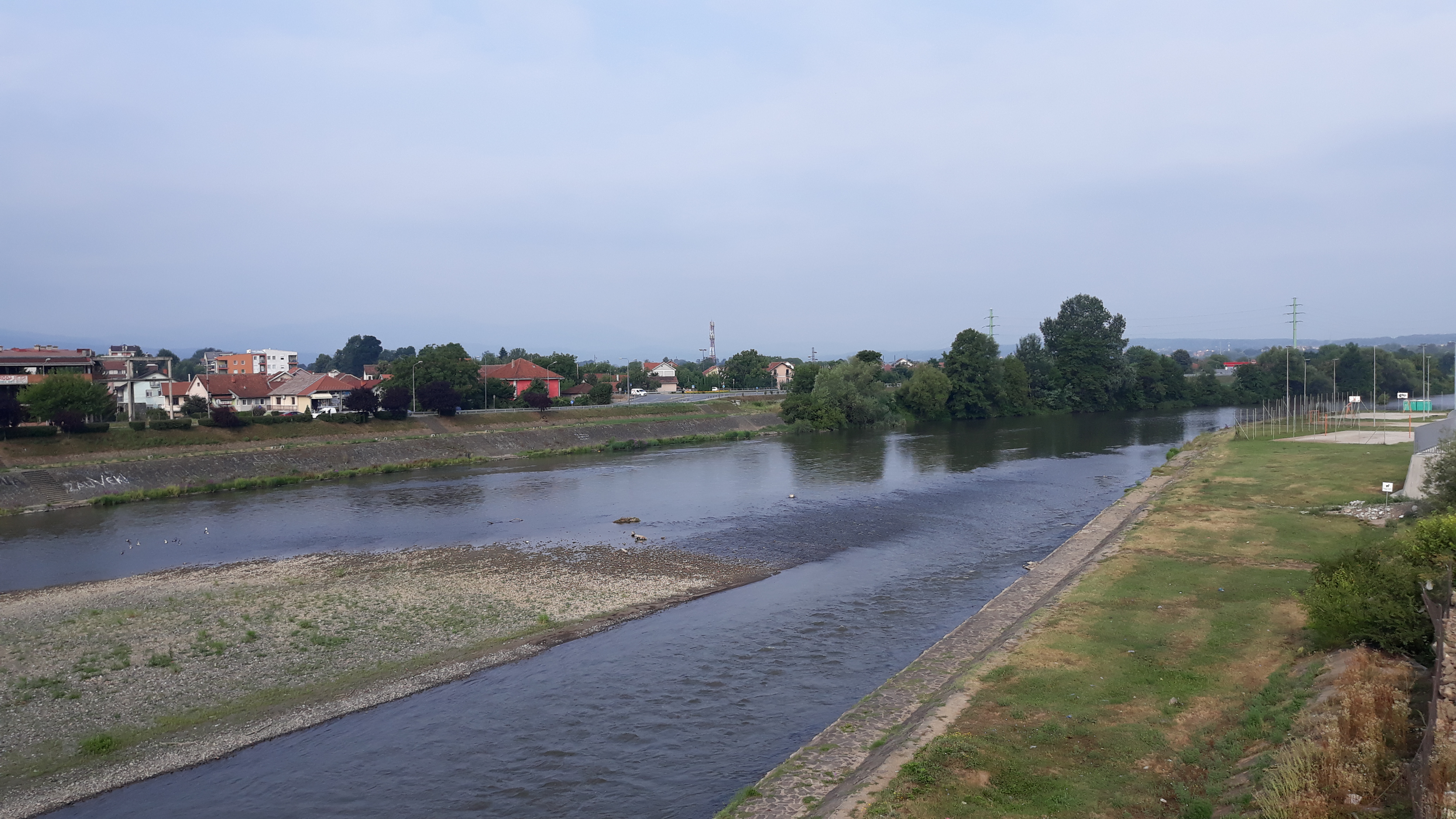 Река Ибар у Краљеву